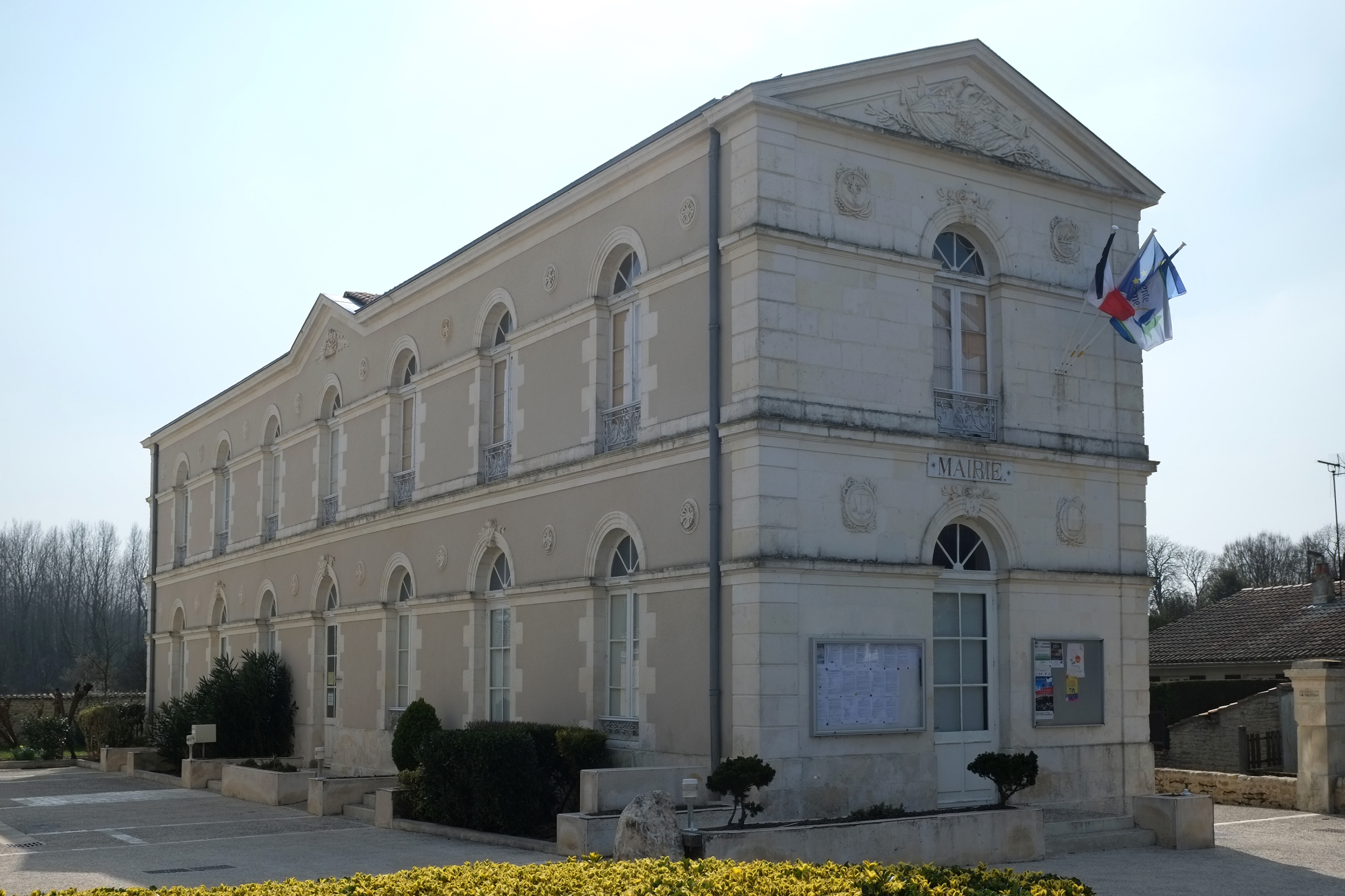 Mairie Saint-Germain-de-Marencennes Charente-Maritime France